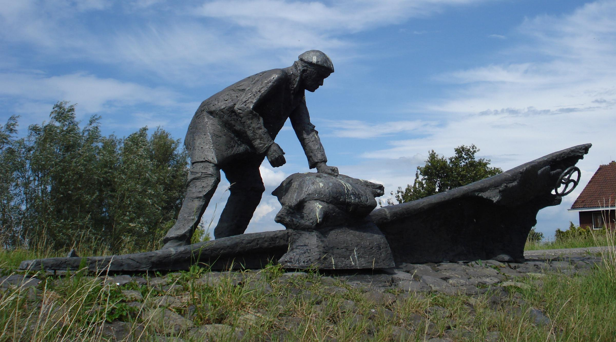 Zuidplas, Nieuwekerk a/d IJssel, Groenendijk halverwege richting Capelle a/d IJssel. Kunstwerk "A. Evegroen - Dubbeltje op zijn kant" van Roel Bendijk. Zuidplas/The Netherlands. FOP.